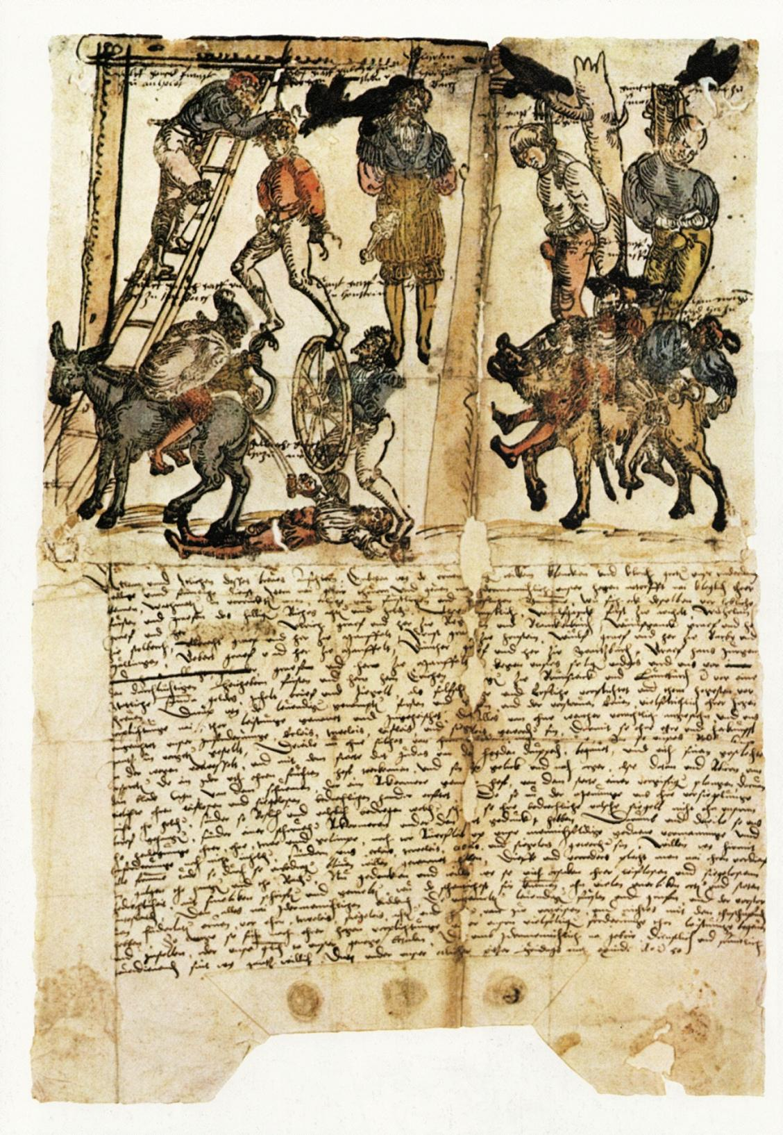 Ein Scheltbrief (Schandbrief) in dem säumige Schuldner öffentlich beschimpft werden (datiert mit 23. Mai 1550). Dokument aus dem Mittelalterlichen Kriminalmuseum in Rothenburg ob der Tauber